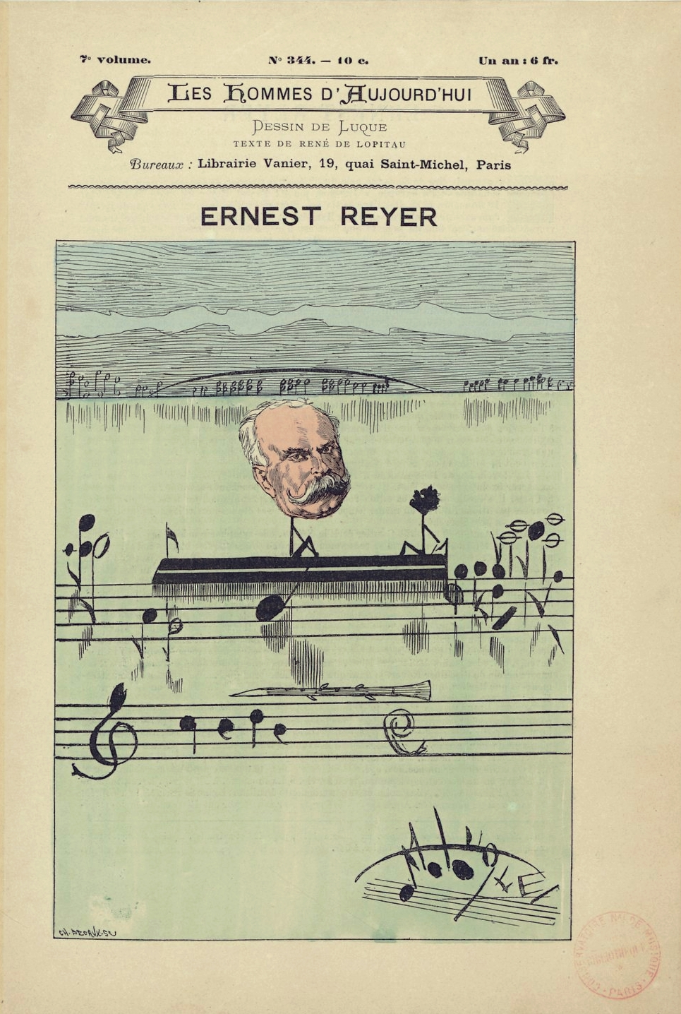 Ernest Reyer, caricature de Manuel Luque pour le n°344 Les Hommes d'aujourd'hui. Bibliothèque nationale de France, département Musique, Est.ReyerE.009